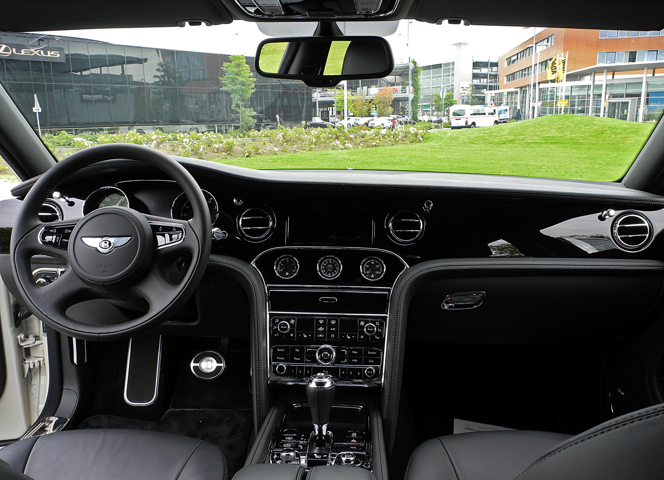 Bentley Mulsanne